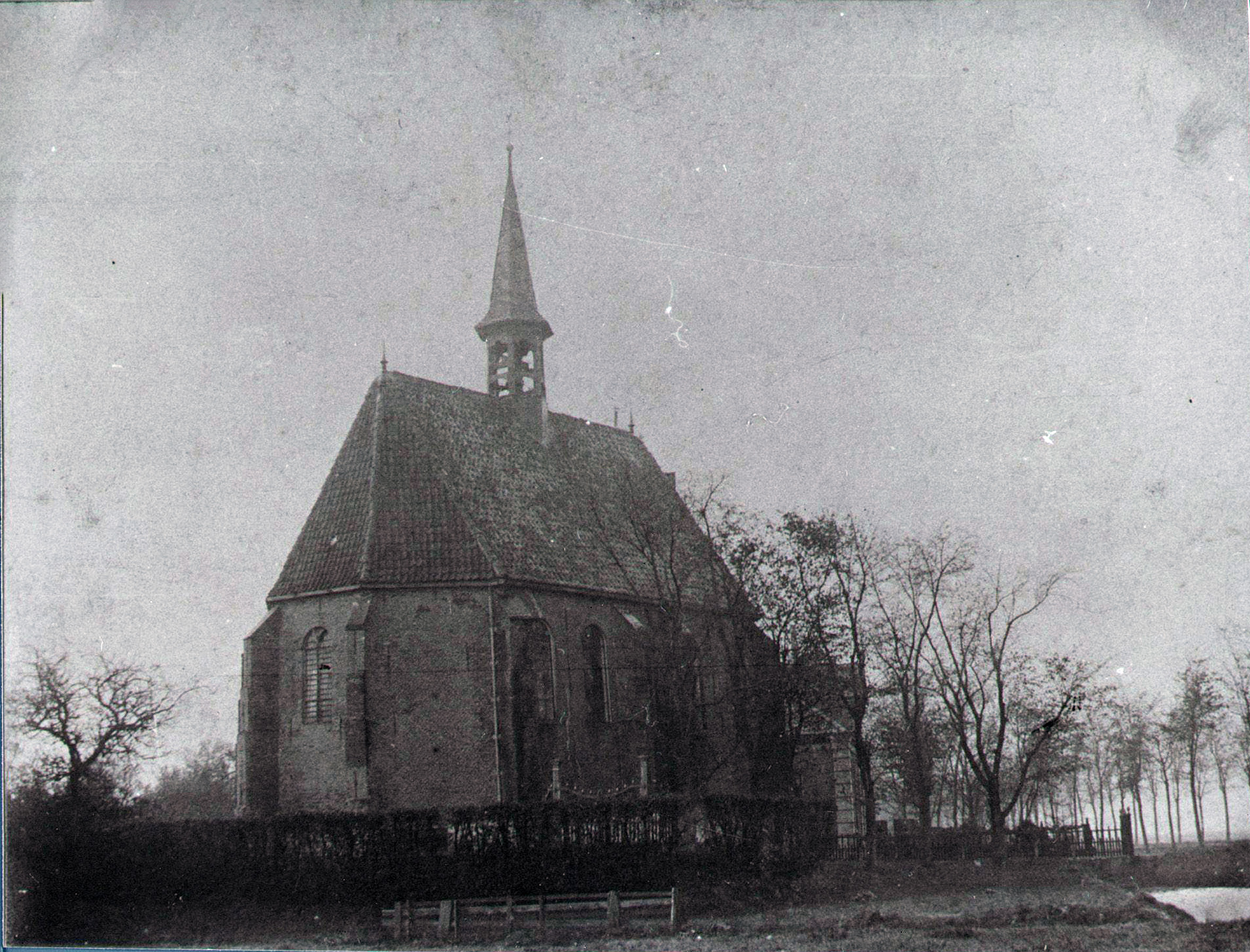 Kerk van Etersheim